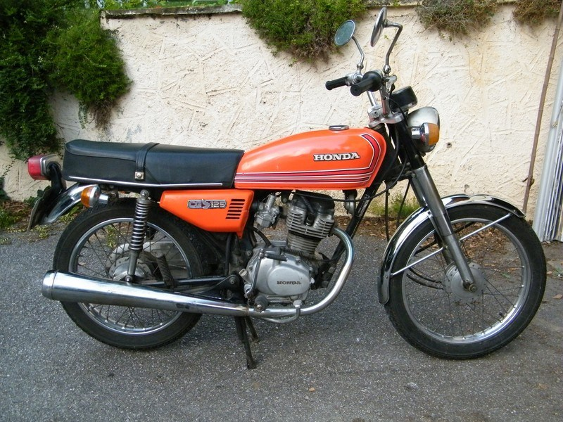 Honda CG 125 Modèle de 1976